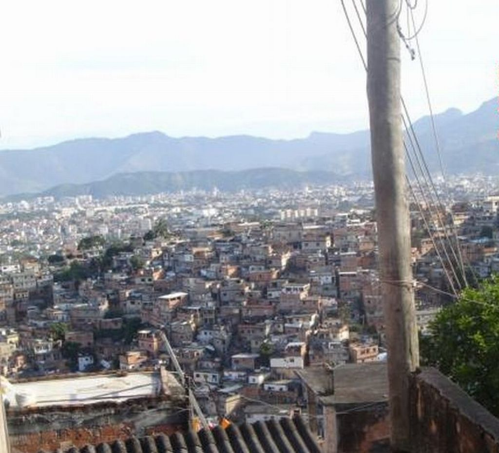 (portuguese) Complexo do Alemão, conjunto de favelas da cidade do Rio de Janeiro, Brasil